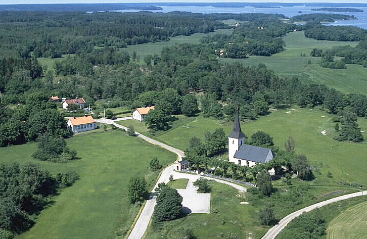 Överenhörna kyrka Motiv: Överenhörna Nyckelord: Flygbilder, Riksintressen Kategori: Kyrkomiljö Överenhörna kyrka.